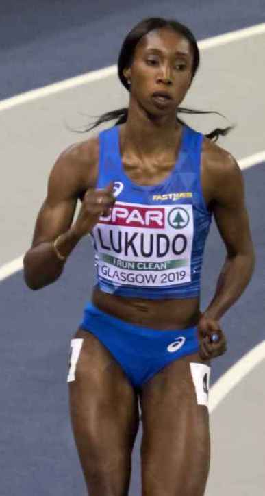 EKI20460 finale 400m dames bolingo sprunger lukudo